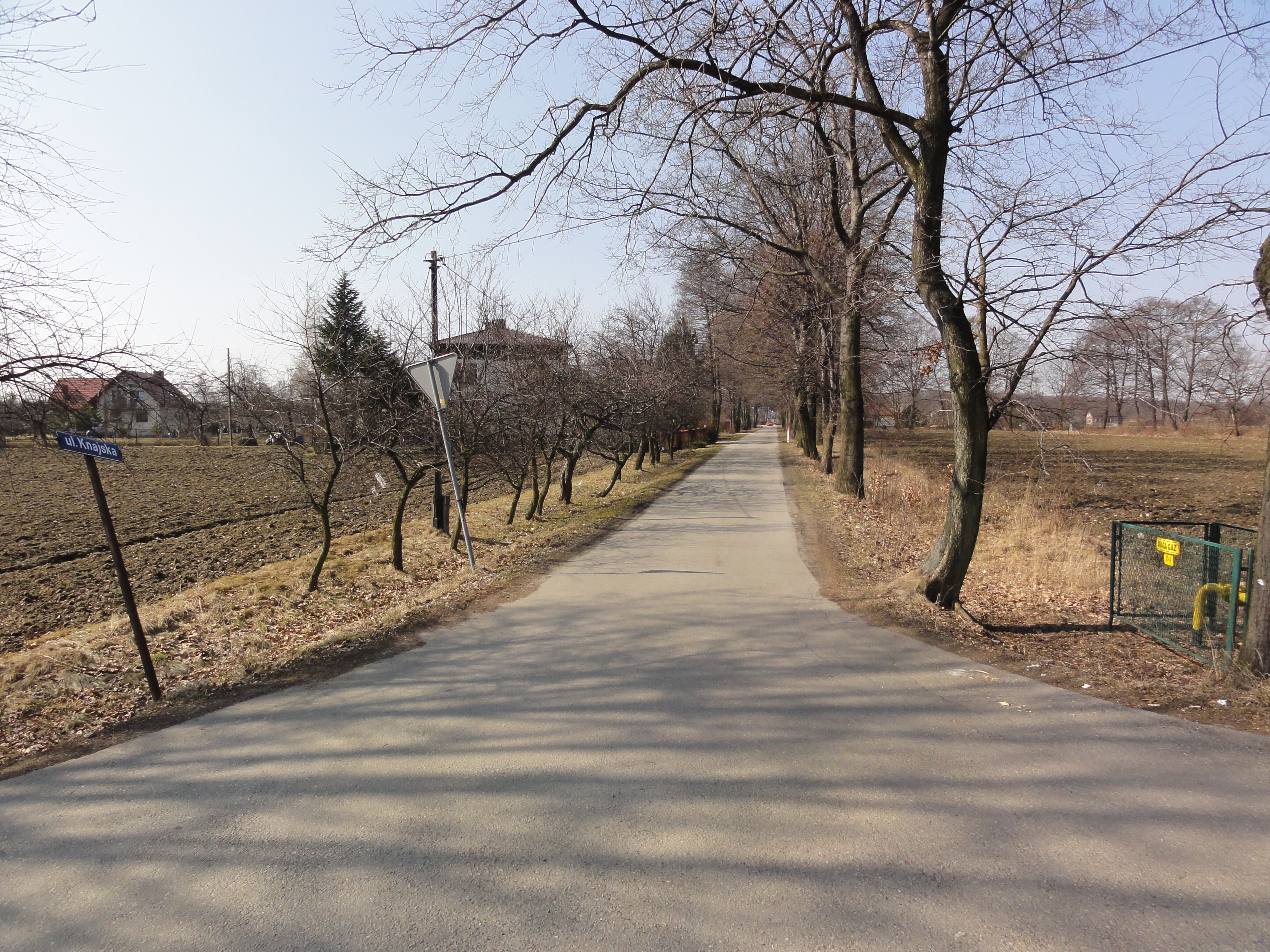 Ul. Knajska w Drogomyślu czyli główna ulica przysiółka Knaj.